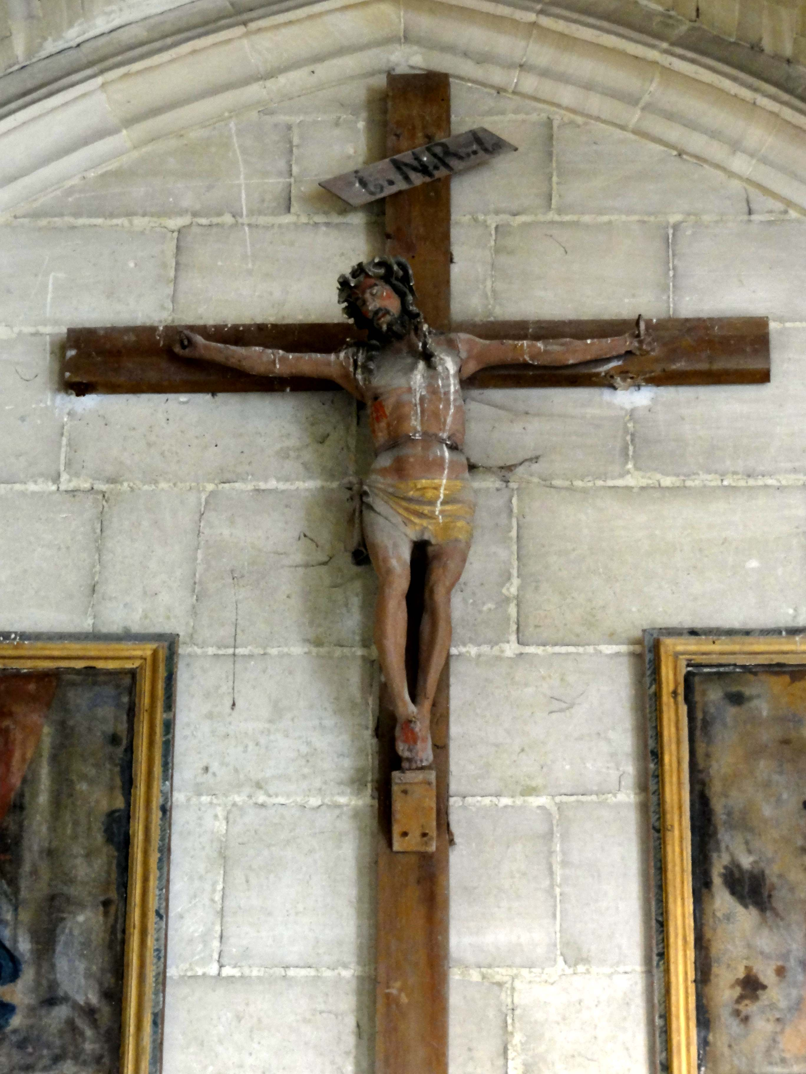 Mobilier de l'église - voir le titre du fichier.